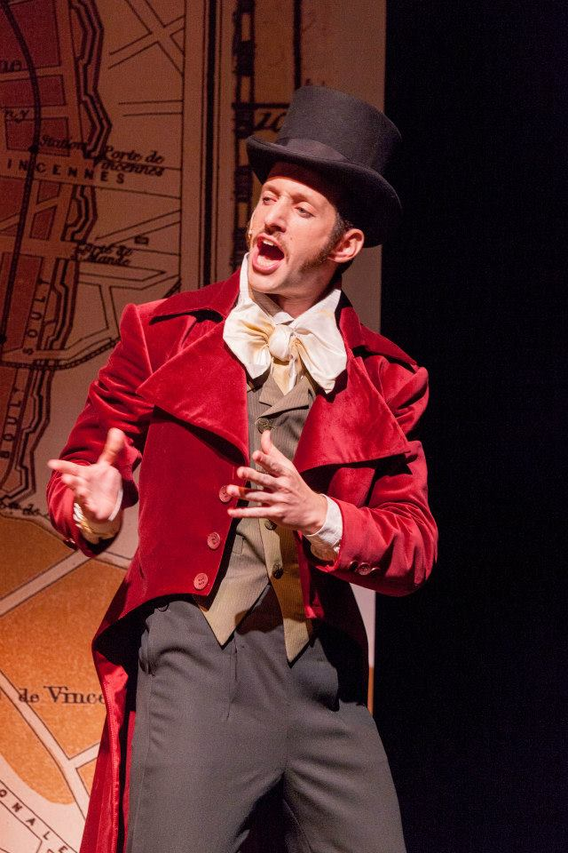 שחר רז בתפקיד המספר בהצגה "אבא גוריו"